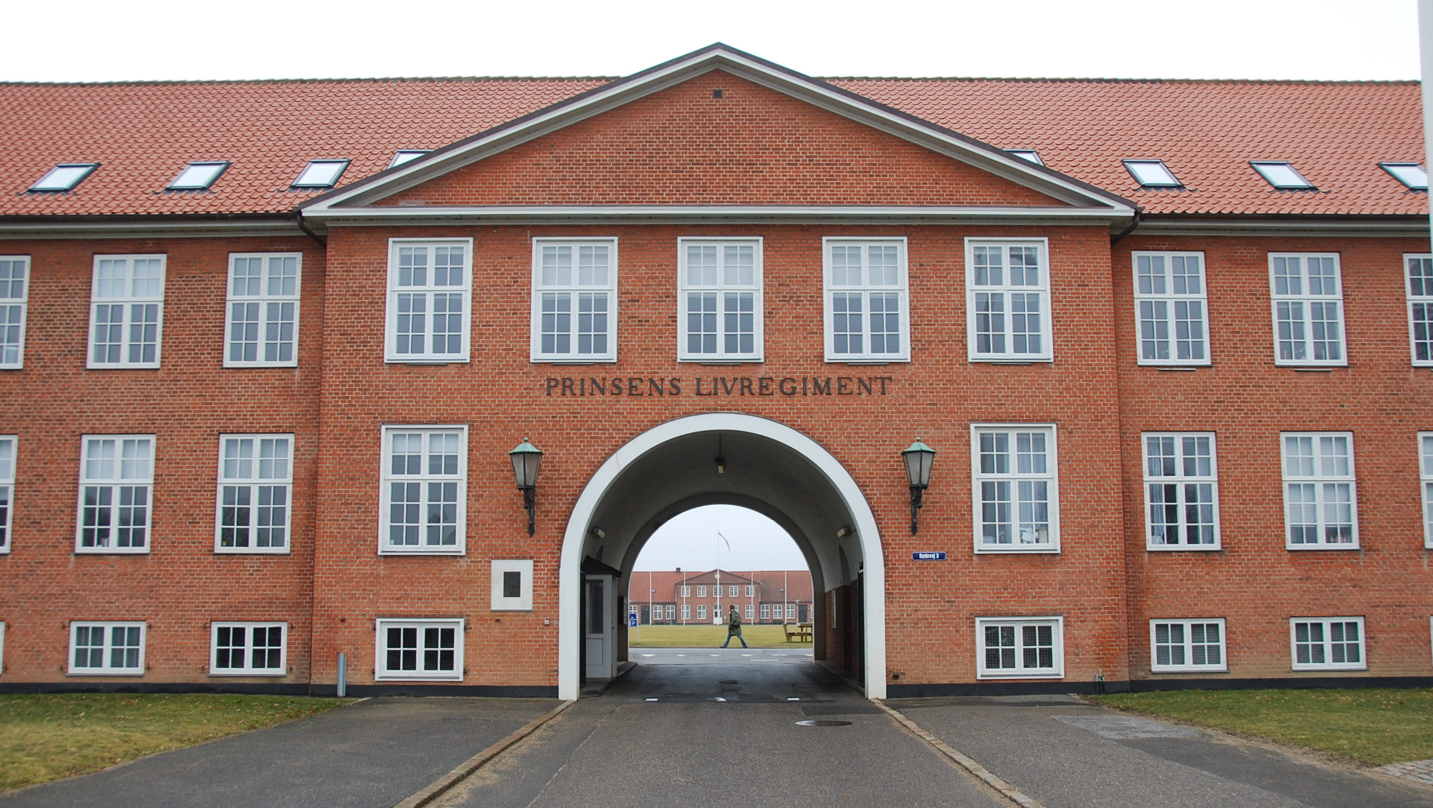 Hovedbygningen på Viborg Kaserne, set fra Rødevej.